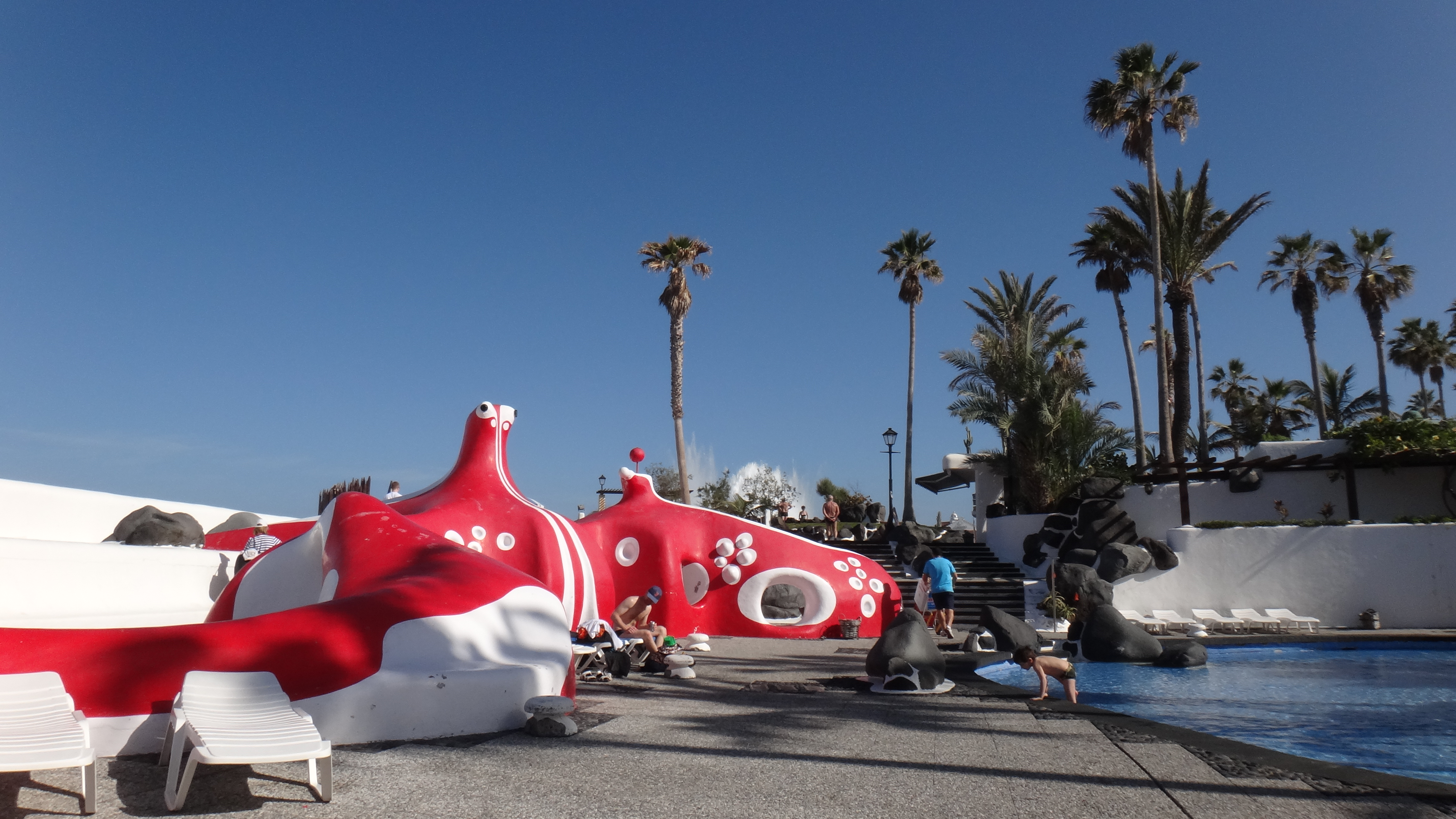 38400 Puerto de la Cruz, Santa Cruz de Tenerife, Spain